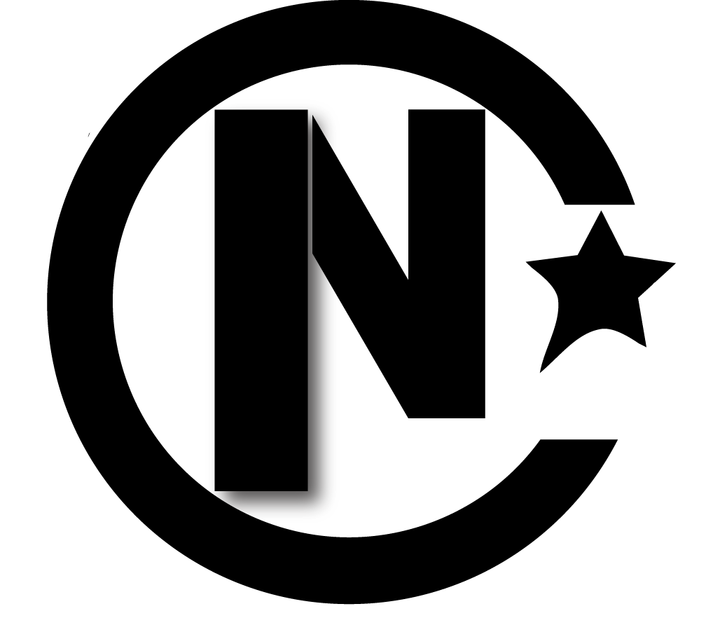 Нэнси логотип эмблема